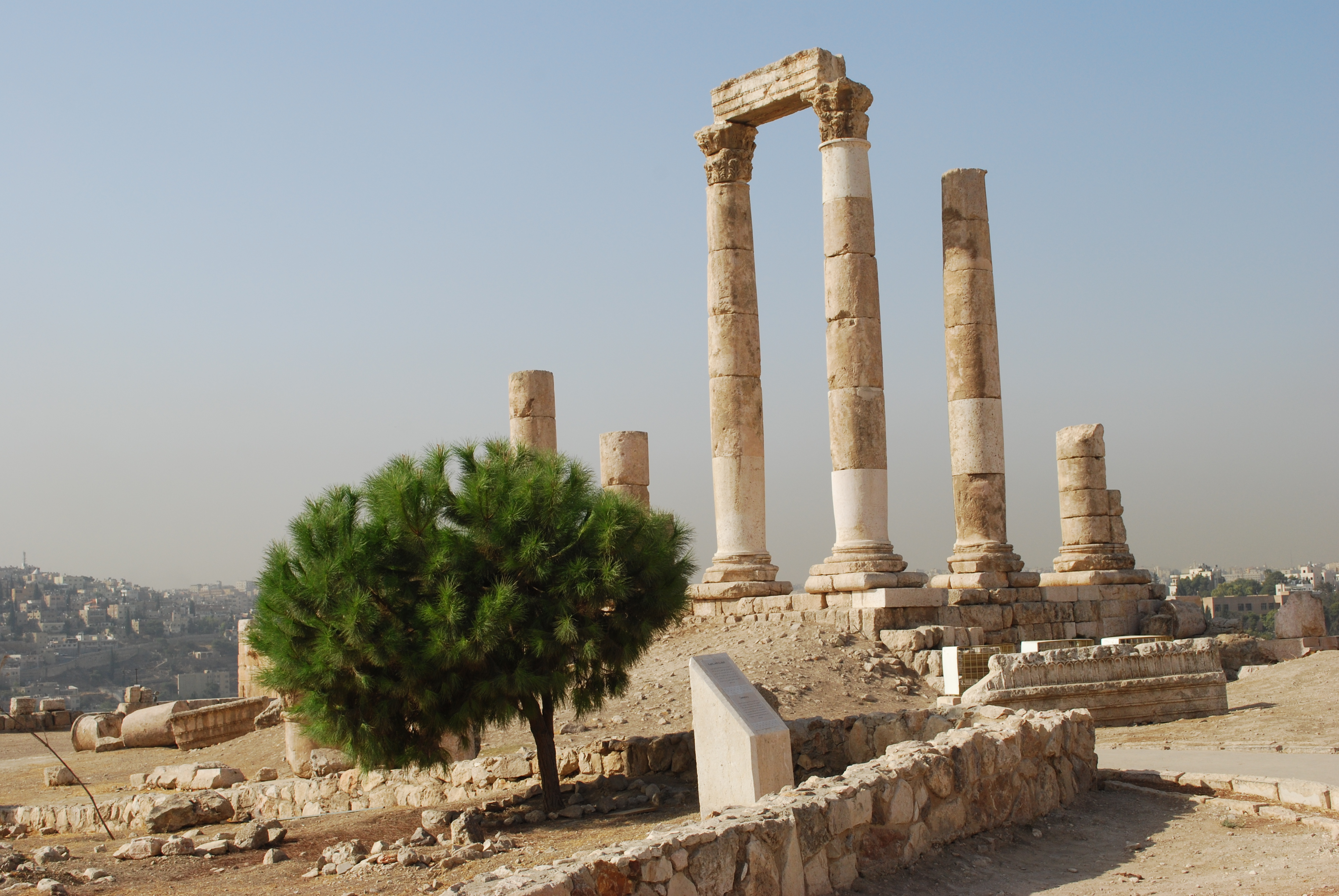 Citadelle d'Amman : le temple d'Hercule.